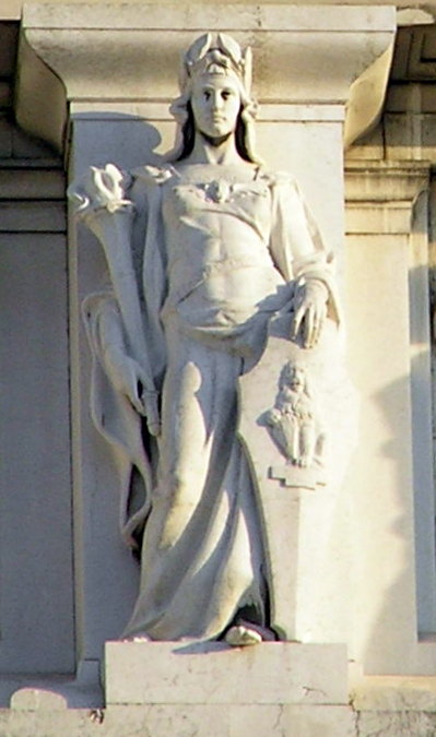 Vittoriano - statue delle regioni - Toscana. Scultura di Italo Griselli (1880-1958).